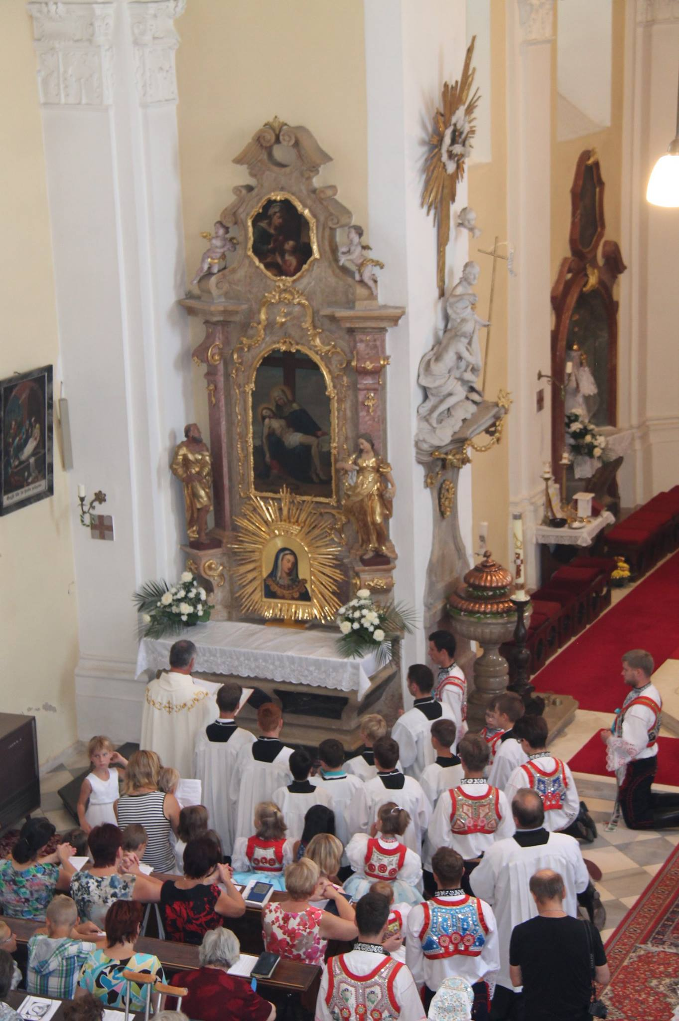 Boční oltář s obrazem Panny Marie Milotické - foto ze slavnosti znovuuvedení obrazu